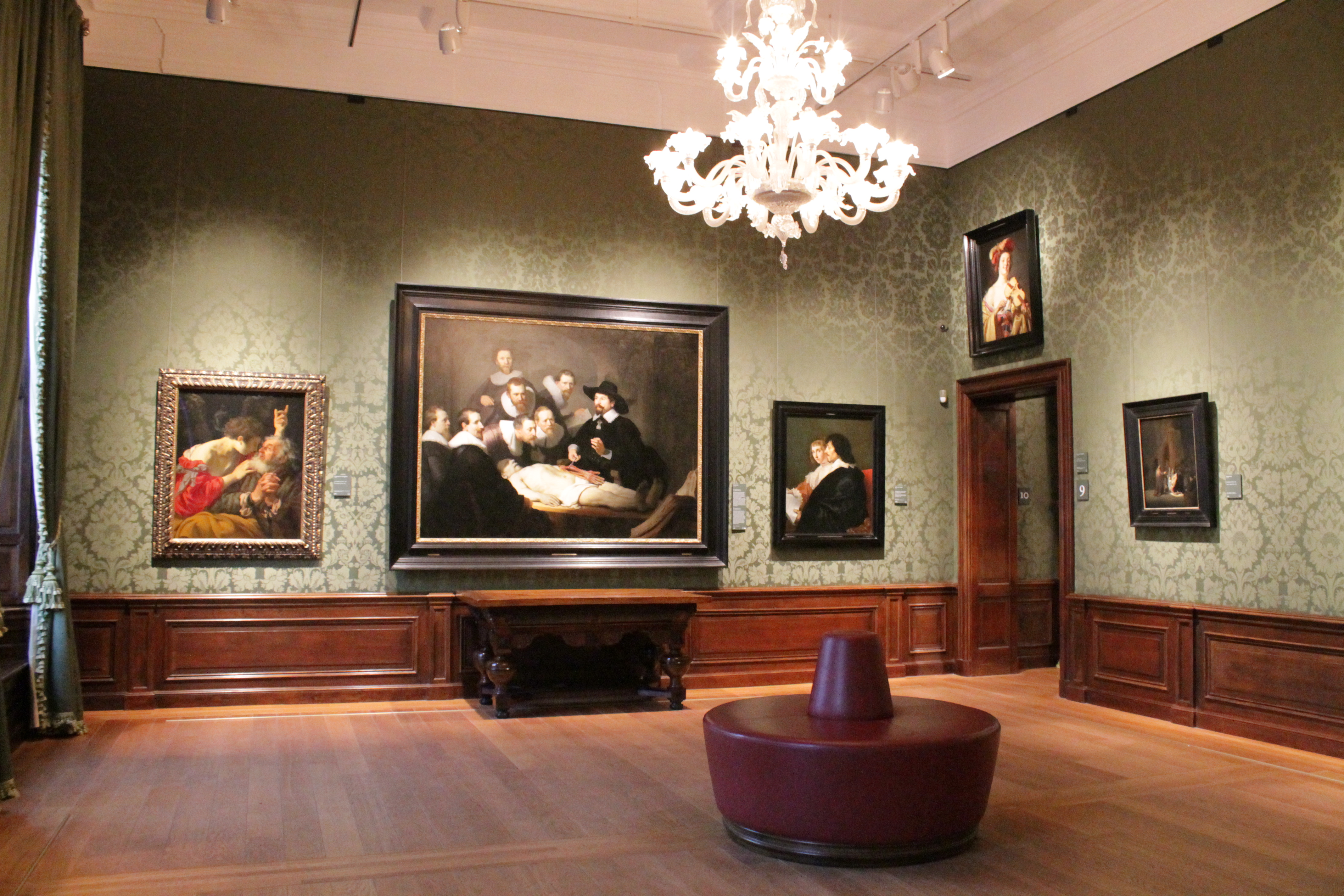 Retrato grupal de Rembrandt